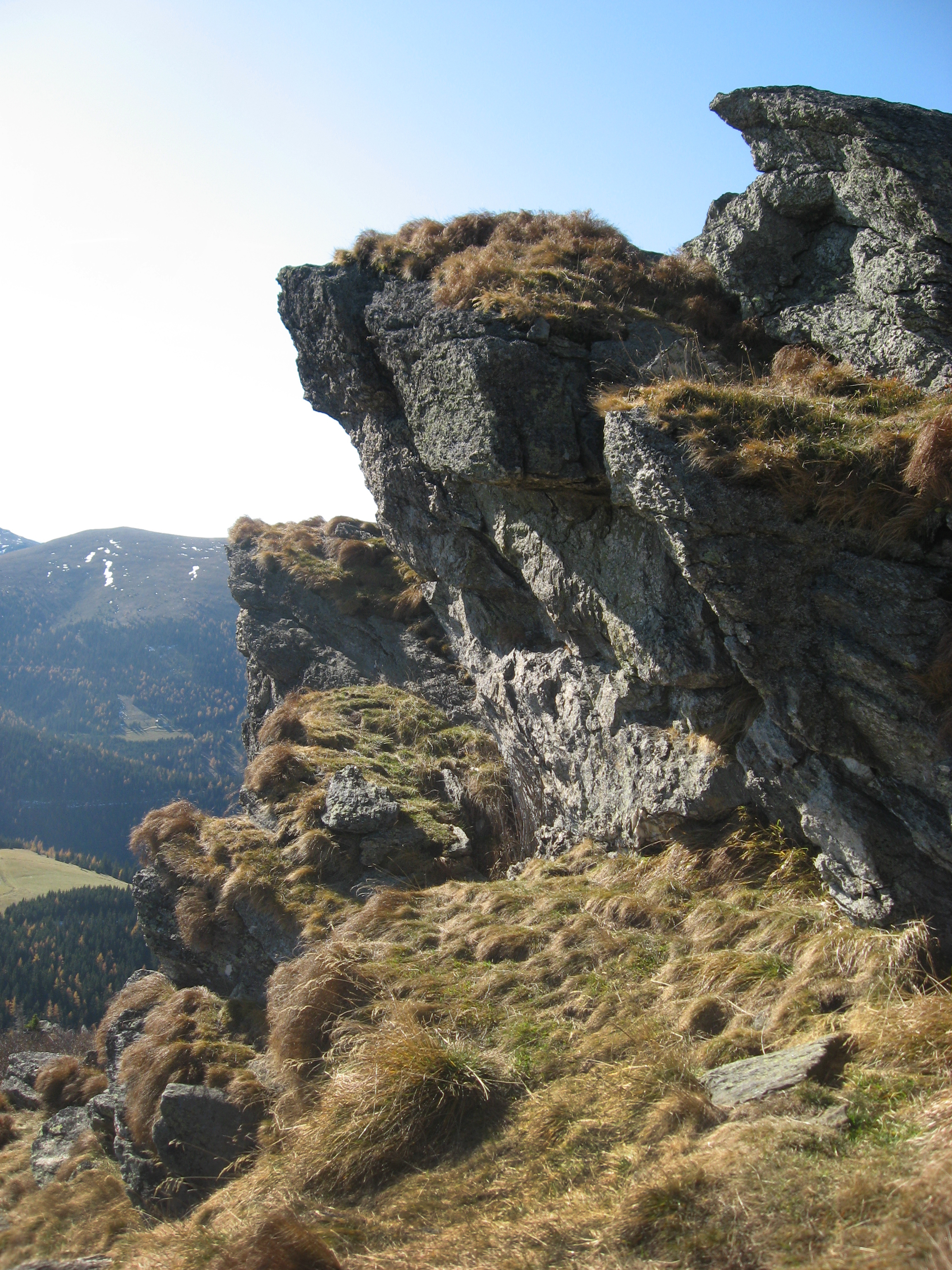 Felsofen am Südgrat des Rappoldkogels